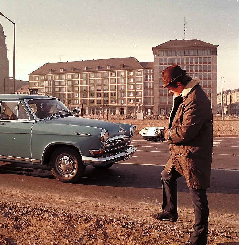 Original image description from the Deutsche FotothekVerkehrslärmmessung